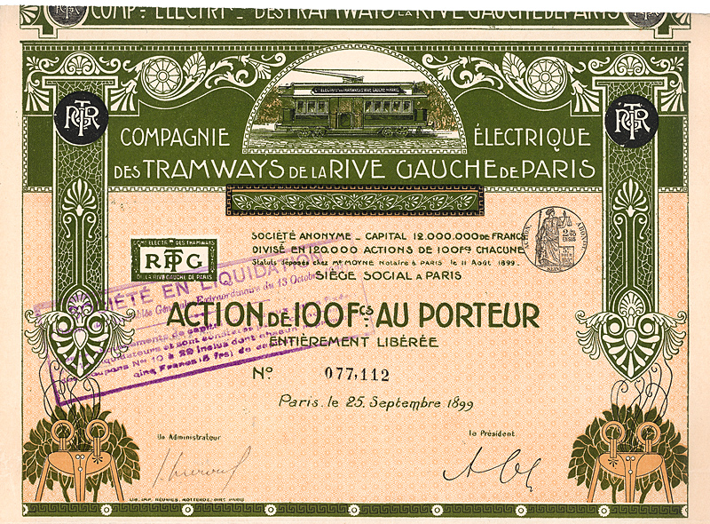 Aktie über 100 FF der Cie Electrique des Tramways de la Rive Gauche von Paris, vom 25. September 1899.